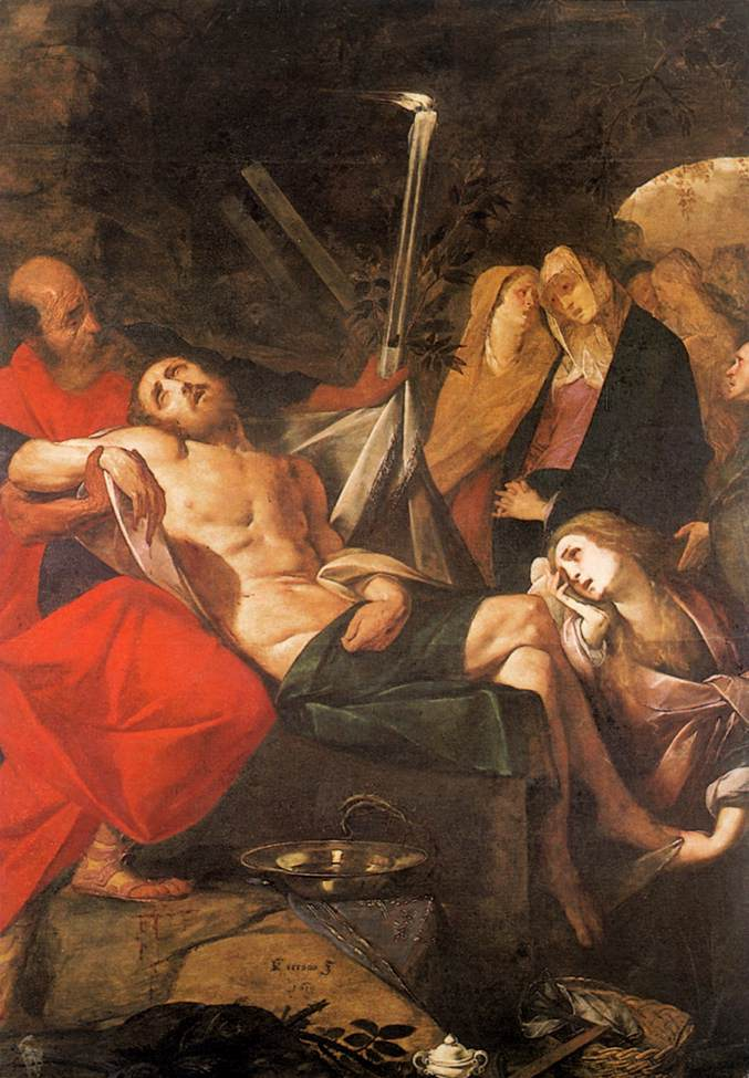 Entierro de Cristo, Museo Civico Novara